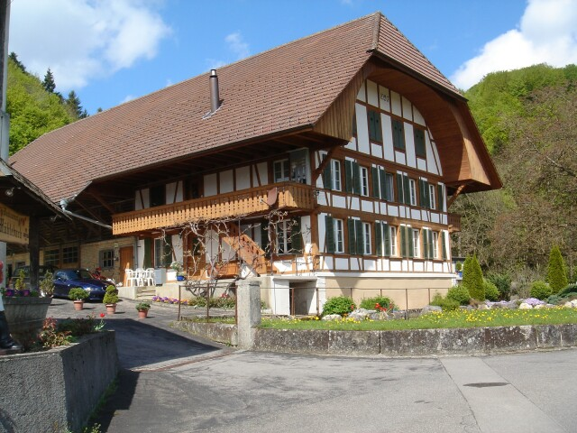 Muehlethurnen (Guerbetal)